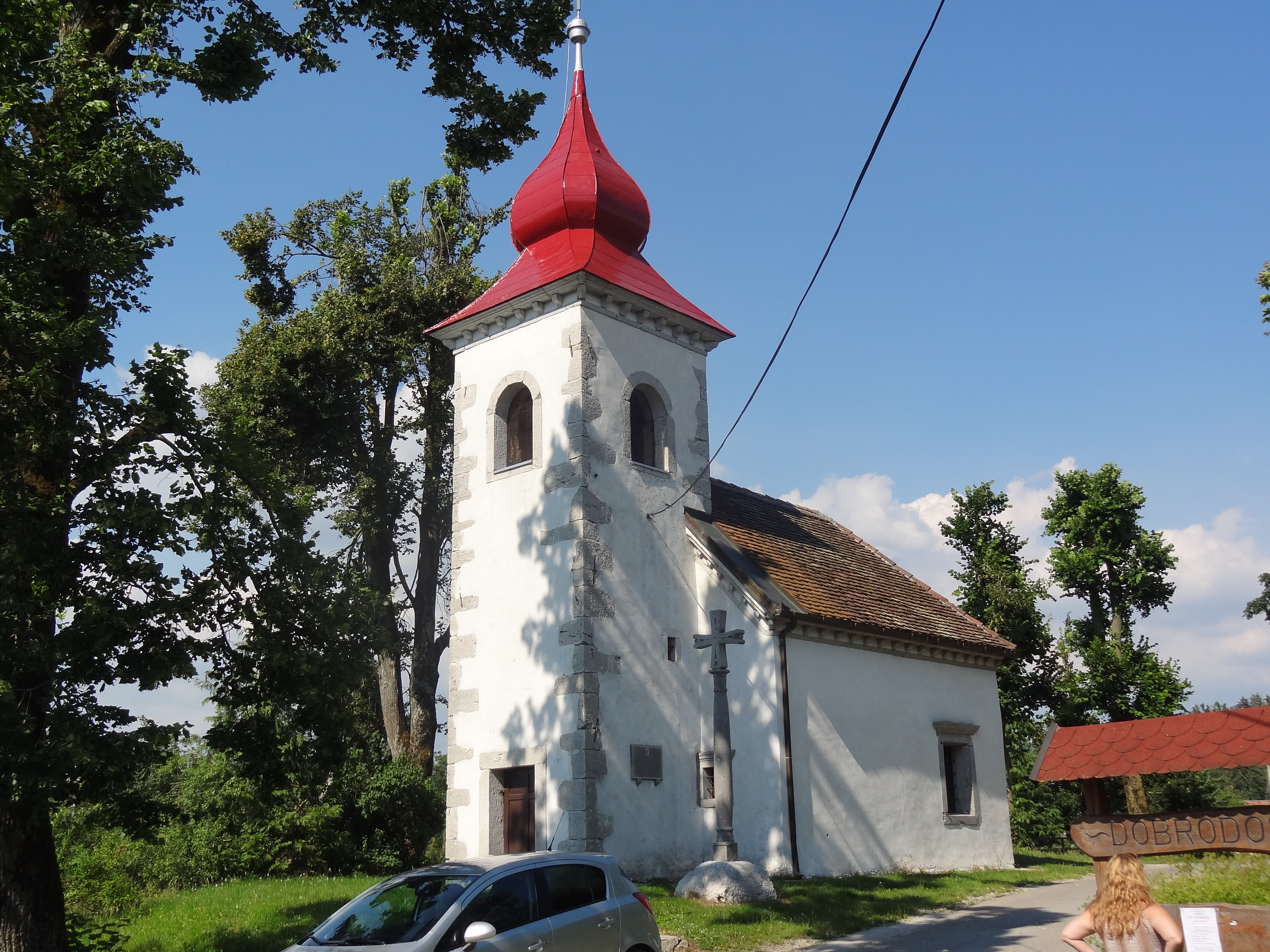 2014 Slovenia Rakitnik (8)